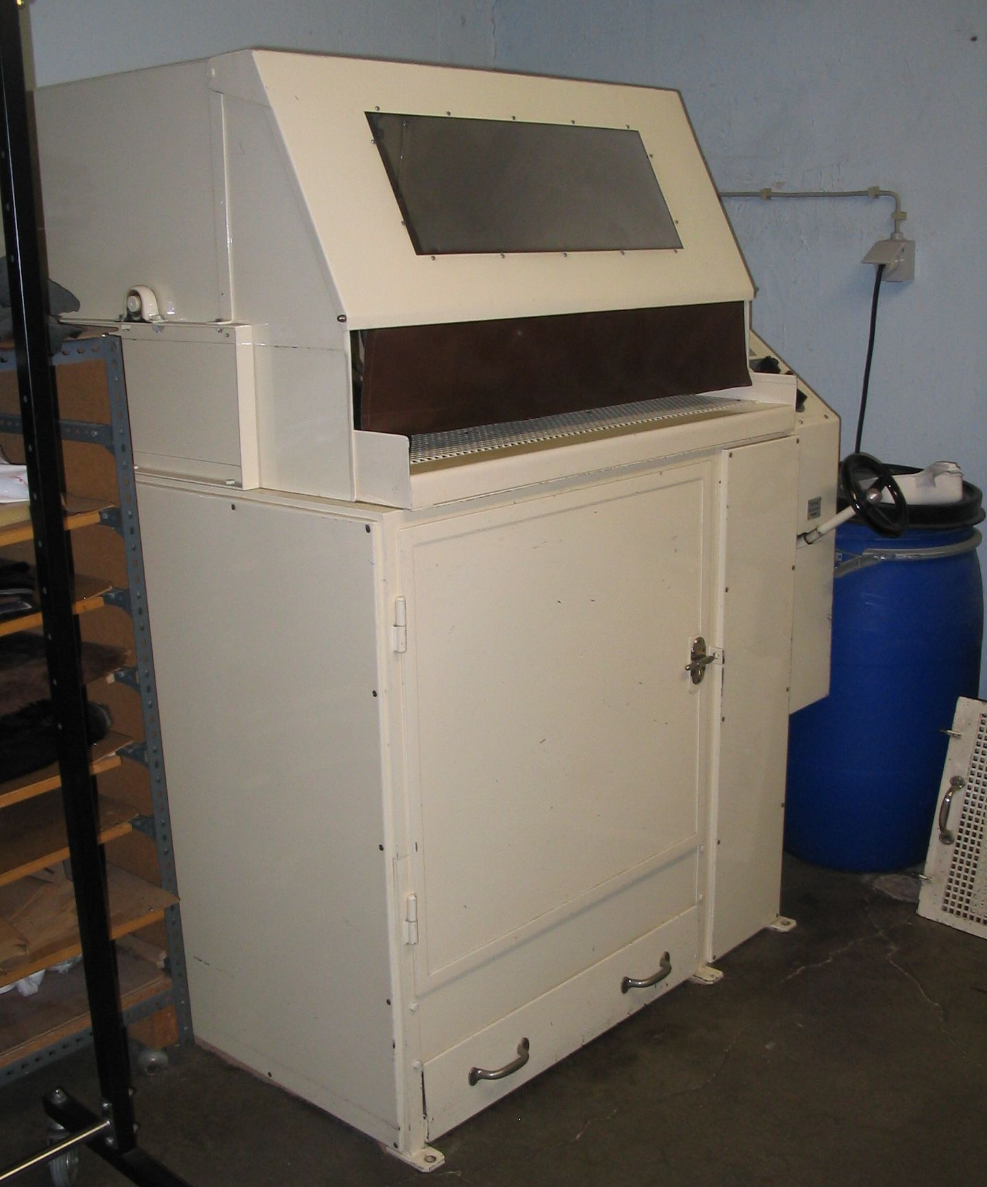 System Baum-Mannheim. Erbauer Firma Karl Hindenlang, Maschinen- und Apparatebau, Wiesenbach bei Heidelberg, Hauptstr. 1. (2009: 74931 Lobbach, Neurott 1) Die kombinierte Klopfmaschine mit Läutertonne hatte im Laufe der Produktionszeit folgende Bezeichnungen: 1948 bis ca. 1960 Typ 401 1960 bis ca. 1971 Typ 820 1971 bis Produktionsende K90 (abgebildet) Werknr.: 3541. Baujahr ca. 1971? (die Maschine wurde in den Jahren 1960 bis 1995 produziert. Die Hindenlang GmbH belieferte das Kürschnerhandwerk ab 1949 mit Maschinen zur Reinigung von Pelzen.). Etwa 1994 war die Firma zum letzten Mal mit einem Stand auf der Frankfurter Pelzmesse vertreten. Im oberen Teil werden die Pelze geklopft, um losen Schmutz und lose Haare zu entfernen, beispielsweise im Rahmen der Pelz-Sommeraufbewahrung (Konservierung). Das Handrad dient zum Regulieren der Klopfstärke. Hinter der Maschine der Staubbeutel. Außerdem zum Entfernen des Reinigungsmehls nach dem Läutern (Reinigen) in der beheizbaren Läutertonne im unteren Teil der Maschine. Die Läuterzeit ist einstellbar. Darunter der Auffangkasten für das Reinigungsmehl und die losen Haare. Links der Deckel für das Fach für Kleinteile, daneben das Schüttelsieb zum Ausschütteln des Läutermehls, dann der Deckel zum Verschließen der großen Tonne. Rechts verschiedene Sorten von Läutermehl (z. B. harzfreies Buchenmehl oder Paranussspäne). Der Konstrukteur Baum ließ 1904 die ersten zwei Klopfmaschinen bauen. In einem alten Firmenprospekt schreibt er dazu: Eine davon lief bei der Pelzfirma Guido Pfeifer, Mannheim, B 1. 3, die andere bei der Fa. Chr. Schwenzke, ebenfalls in Mannheim, welche vollständig aus Eisen erstellt waren. Das Verstärken der Schläge wurde damals durch Heben und Senken des Klopftisches bewerkstelligt. Diese Klopfmaschine ist bis 1936 bei der Fa. Schwenzke in Betrieb gewesen und hat bis dahin allen Anforderungen entsprochen. Gesehen bei Firma CHR. SCHAD PELZ UND LEDER, Ludwigshafen